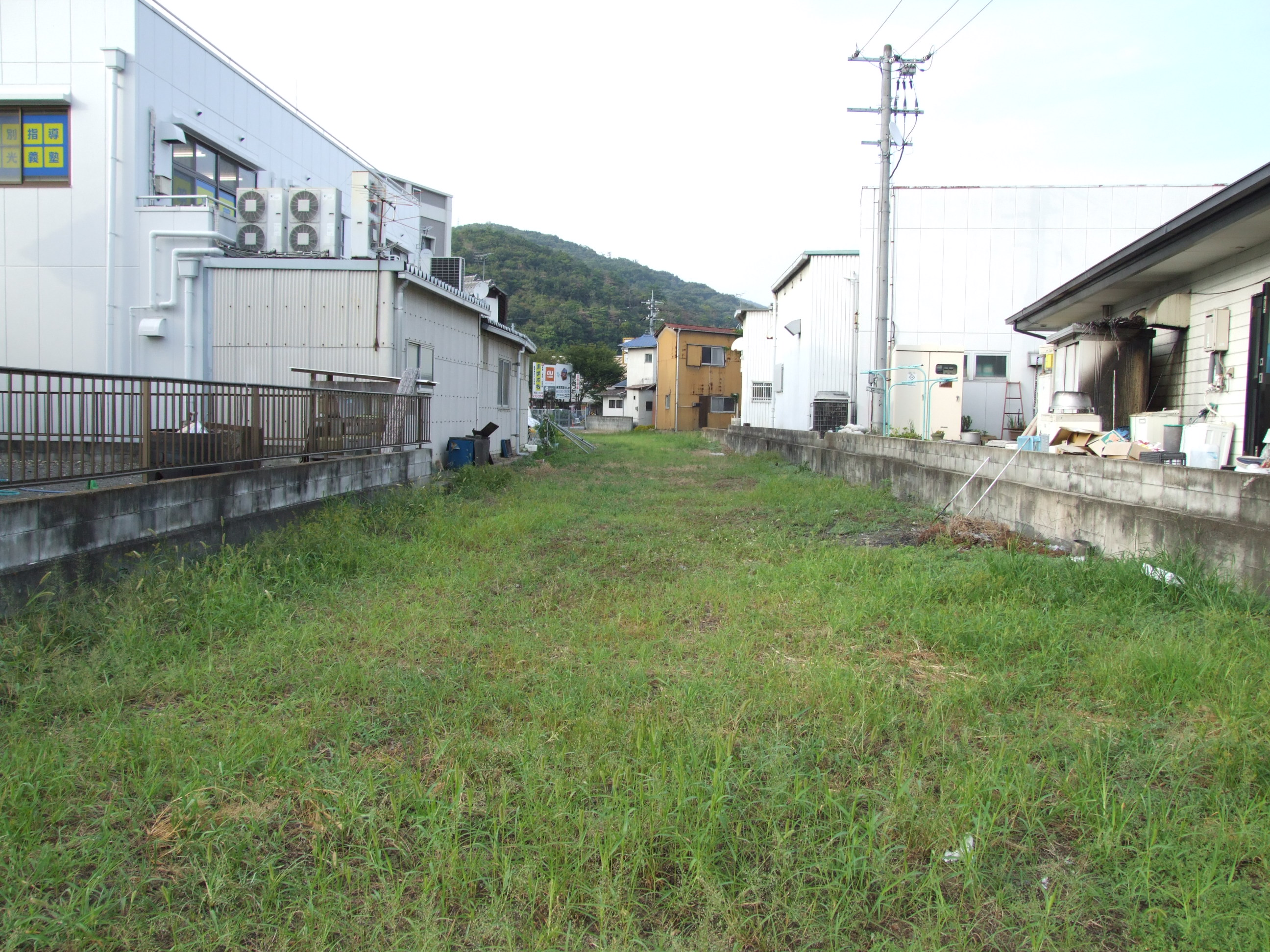 2009年8月現在の旧片上鉄道片上駅前ロータリーの様子